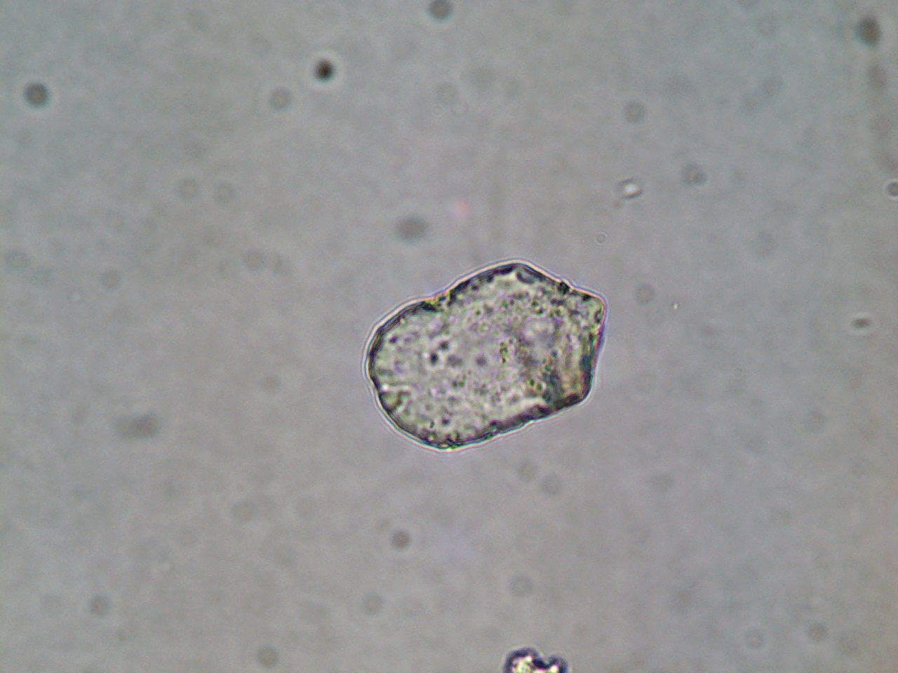 Photographie au microscope d'un phytolithe (cellule bulliforme)